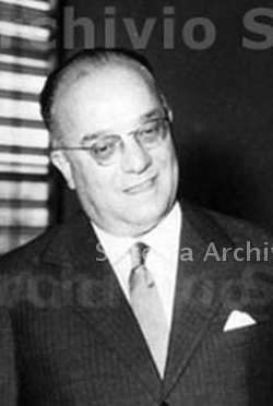 Gaudenzio Bono